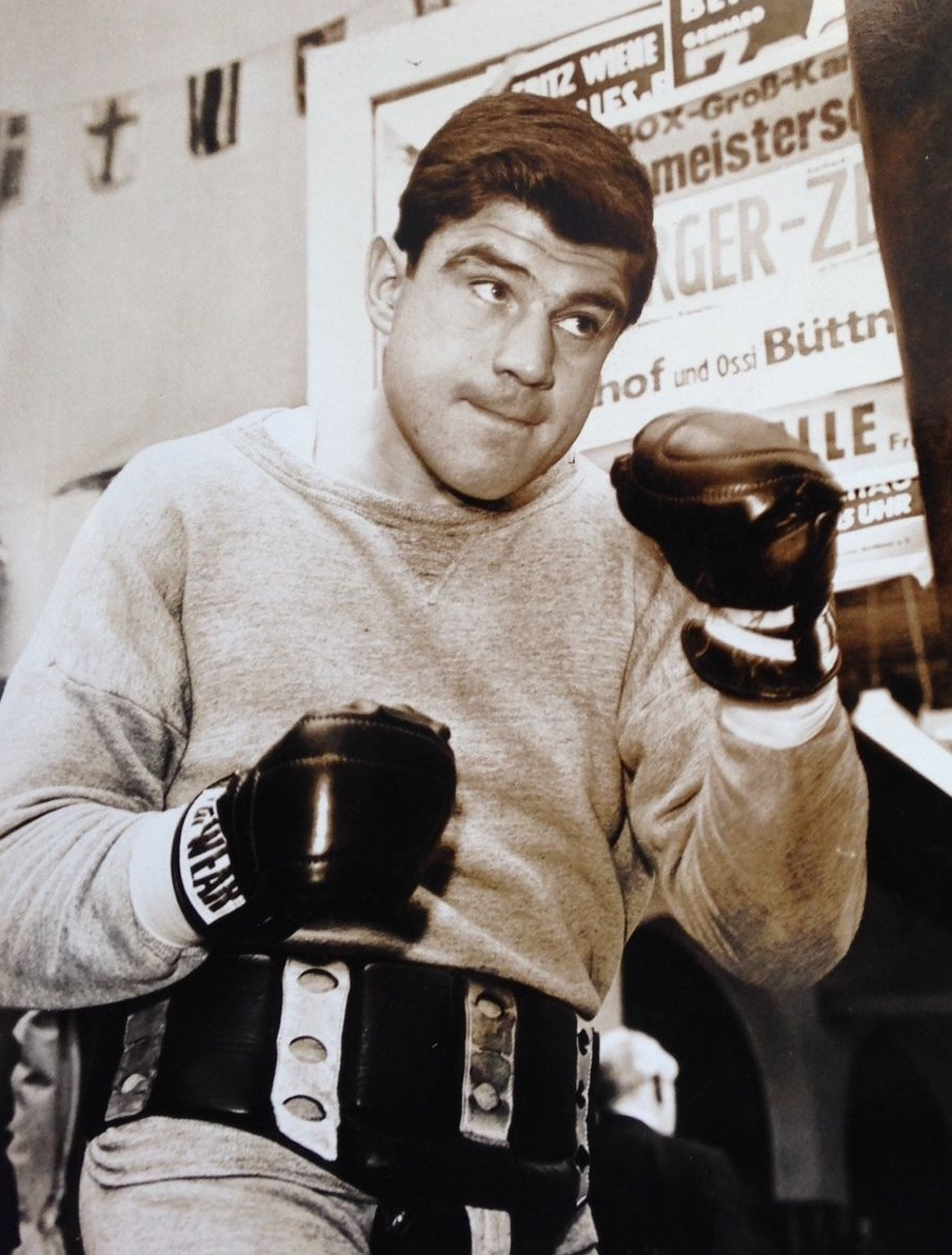 ORIGINAL 1966 KARL MILDENBERGER EUROPEAN HEAVYWEIGHT BOXING CHAMPION WIRE PHOTO